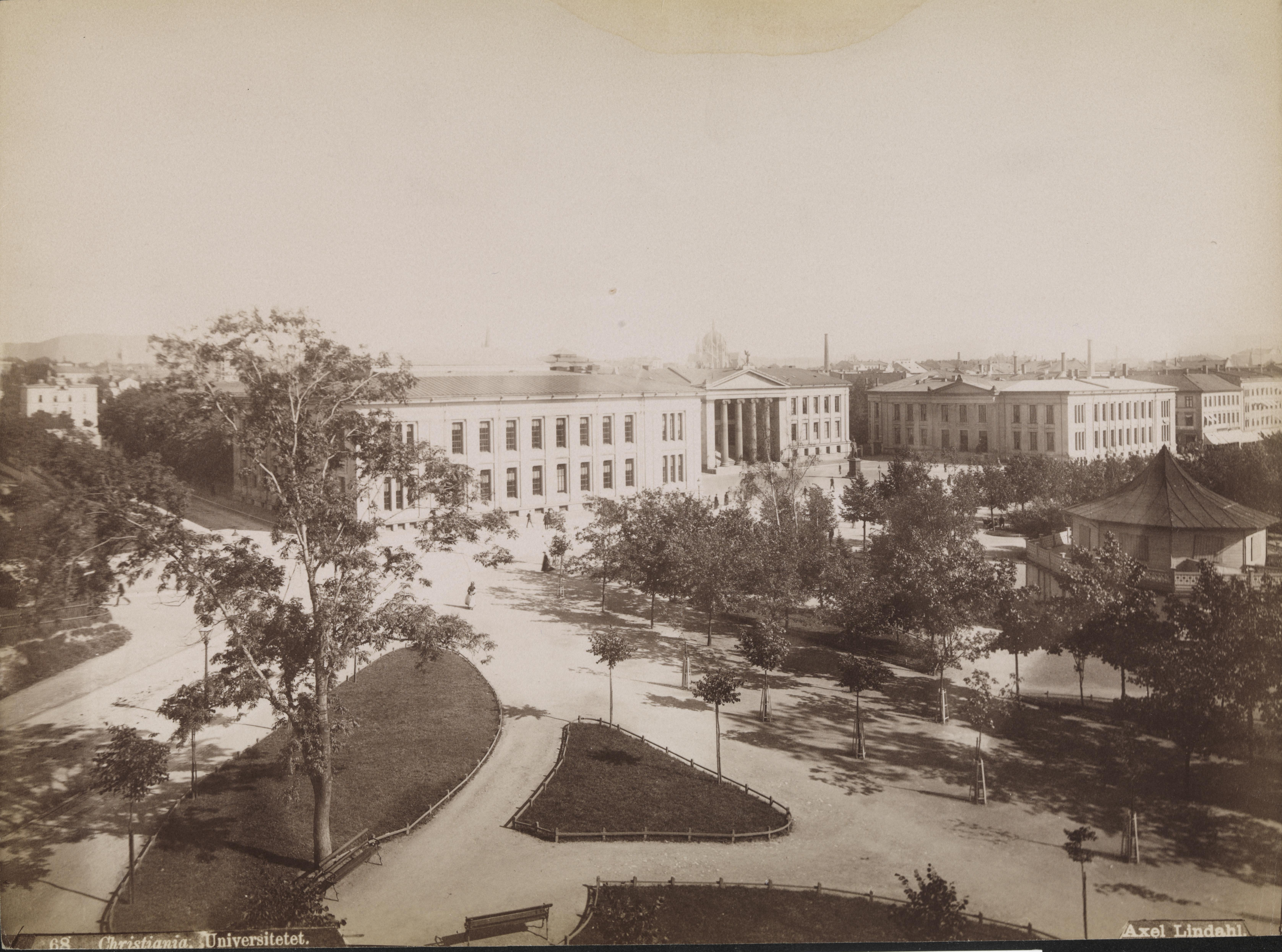 Christiania, Universitetet Sted: Universitetet i Oslo Kommune: Oslo Fylke: Oslo Tagger: eksteriør fasader bylandskap